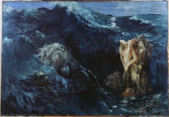 Charybde et Scylla.title QS:P1476,es:"Charybde et Scylla." label QS:Les,"Charybde et Scylla."